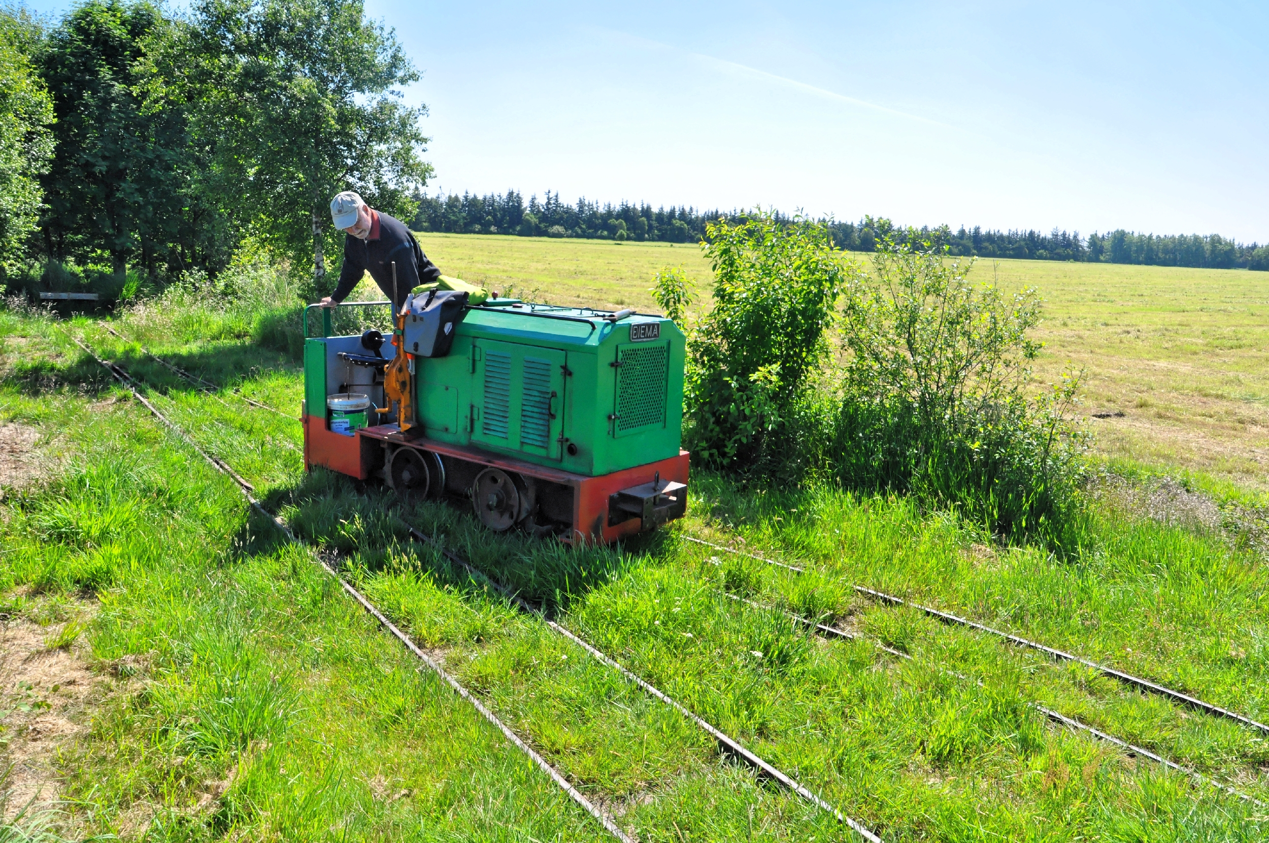 Bilder aus dem Ahlenmoor